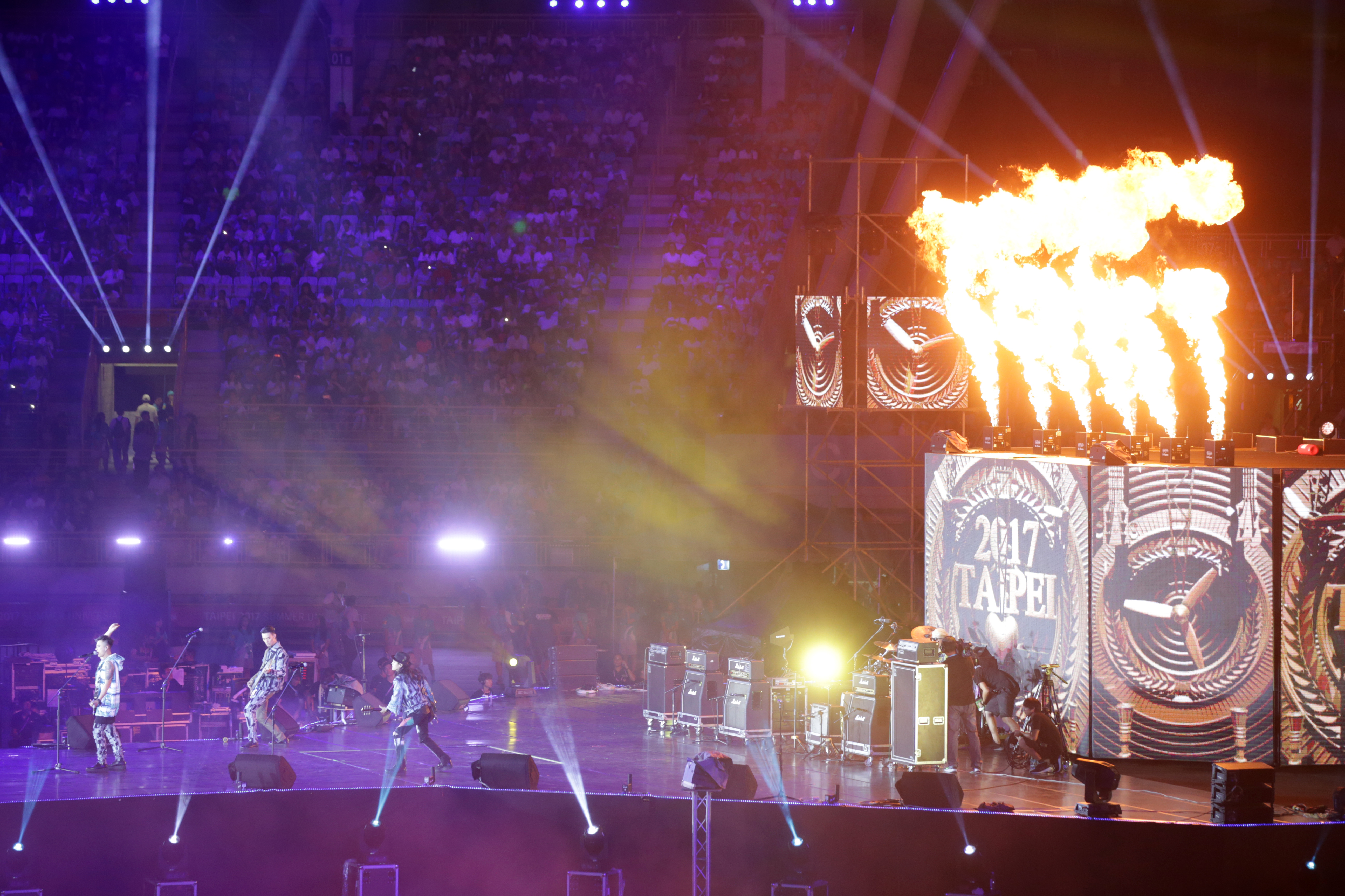 授權方式及範圍：中華民國總統府│政府網站資料開放宣告 Authorization Method & Scope: Office of the President, Republic of China (Taiwan) | Government Website Open Information Announcement